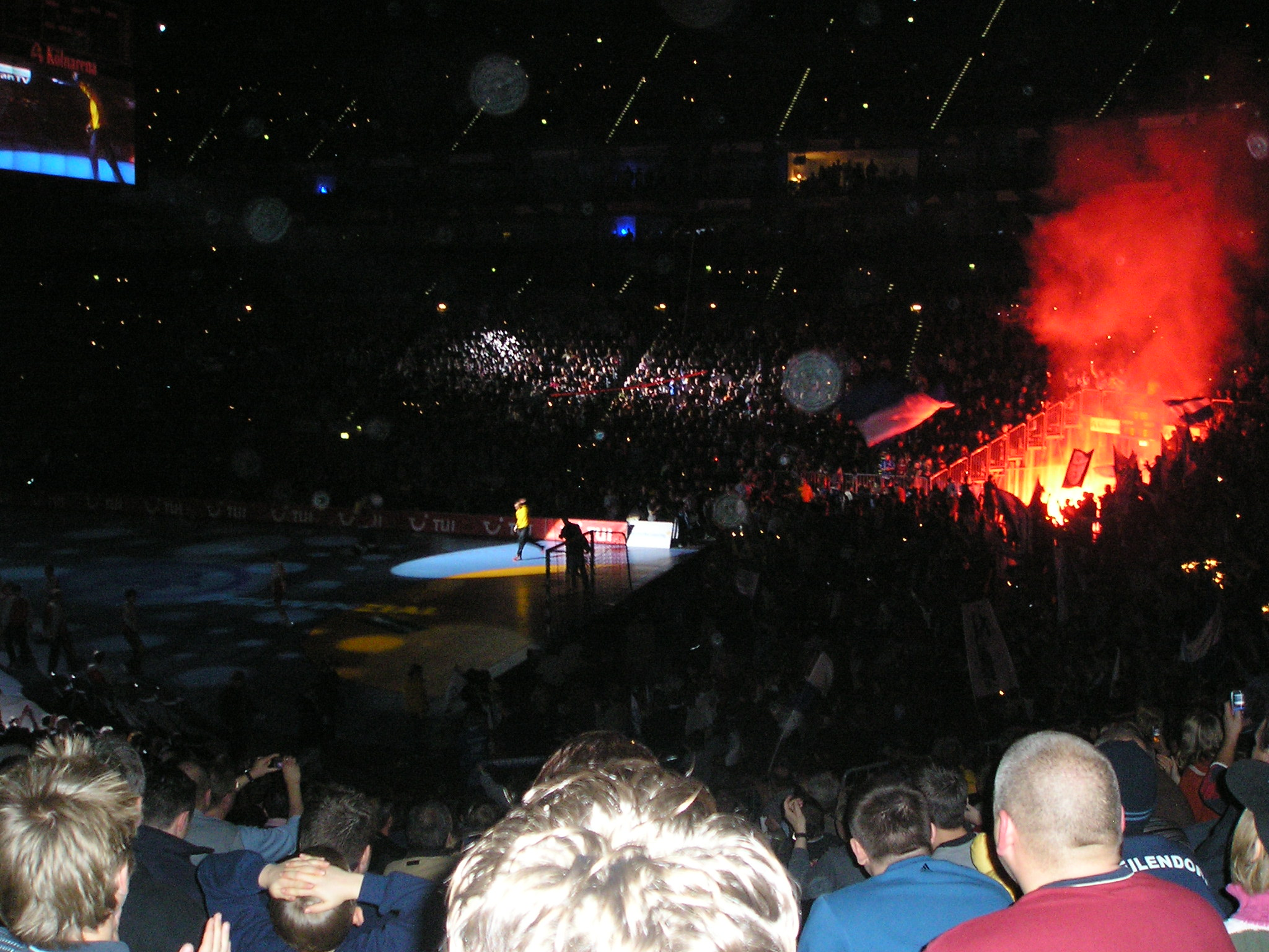 Die Kölnarena bei einem Spiel des VfL Gummersbach